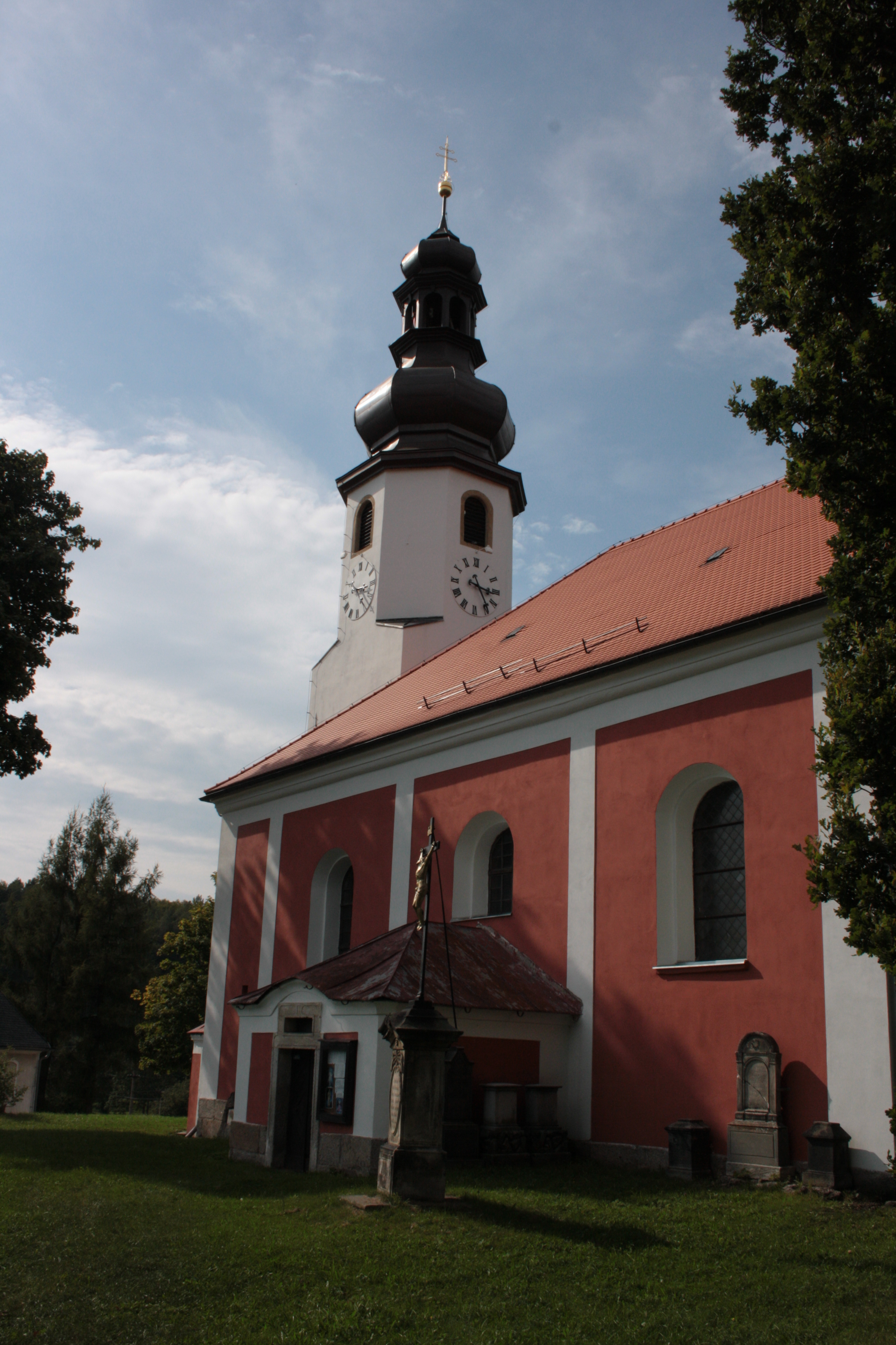 This photograph was taken with a DSLR from WMCZ's Camera grant. Věž kostela svatého Mikuláše v Mníšku poblíž Liberce.